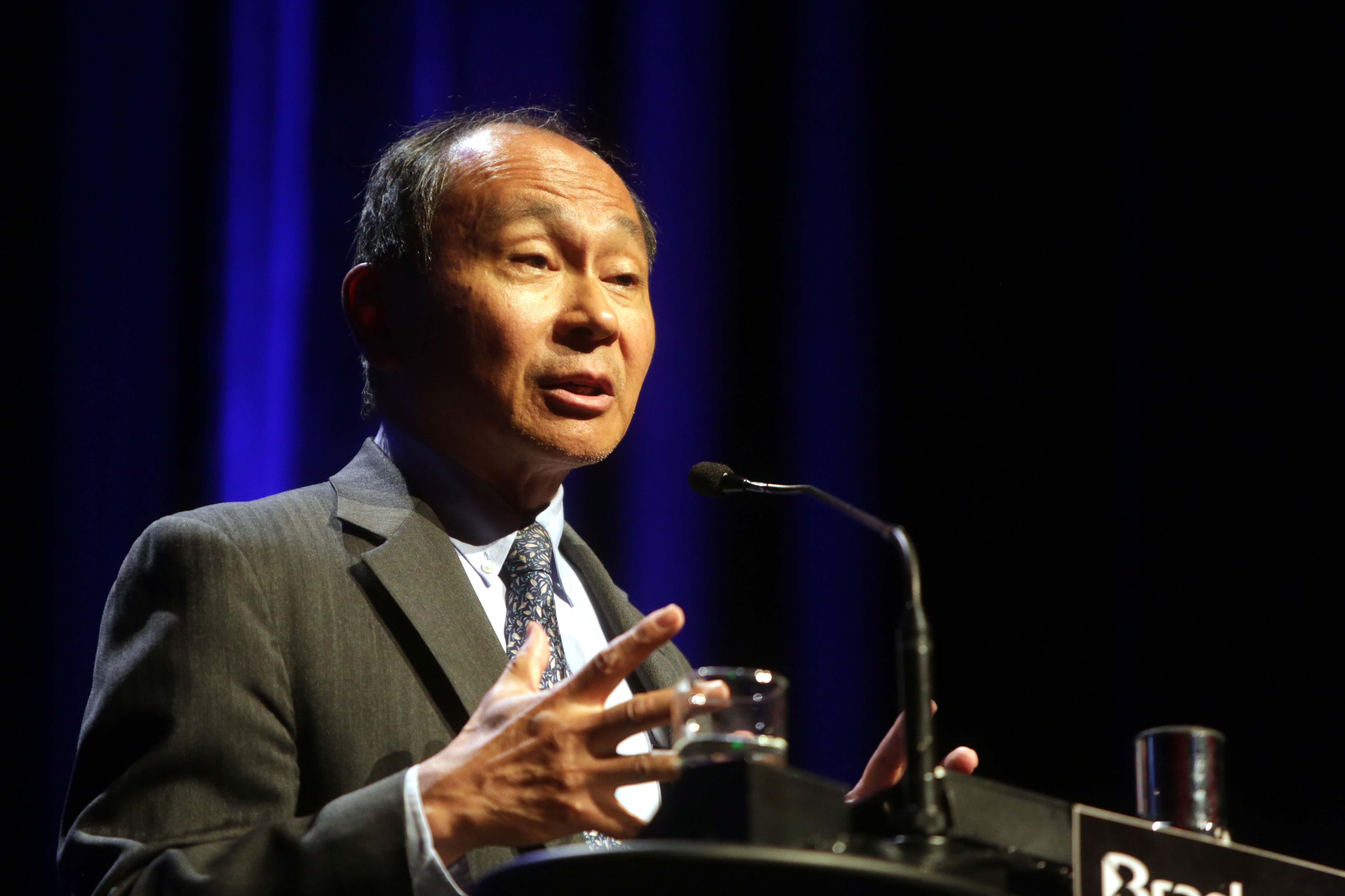 Convidado: Francis Fukuyama, cientista político norte-americano Data: 29 junho de 2016 Local: Teatro Cetip-Complexo Ohtake Cultural Crédito das imagens: Fronteiras do Pensamento/Greg Salibian Francis Fukuyama at Fronteiras do Pensamento São Paulo